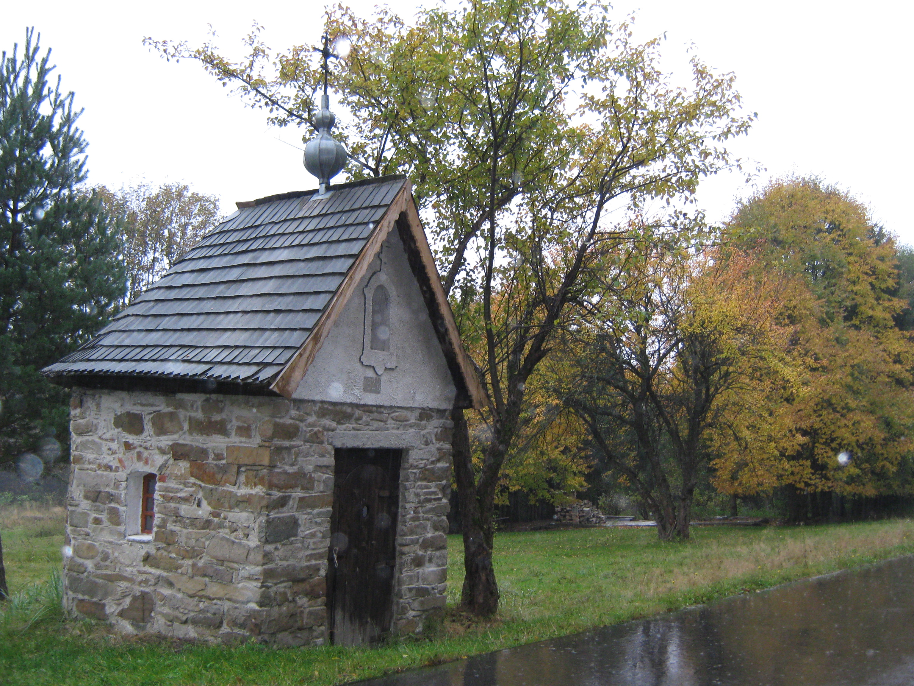 Kapliczka przydrożna w Rozstajnem